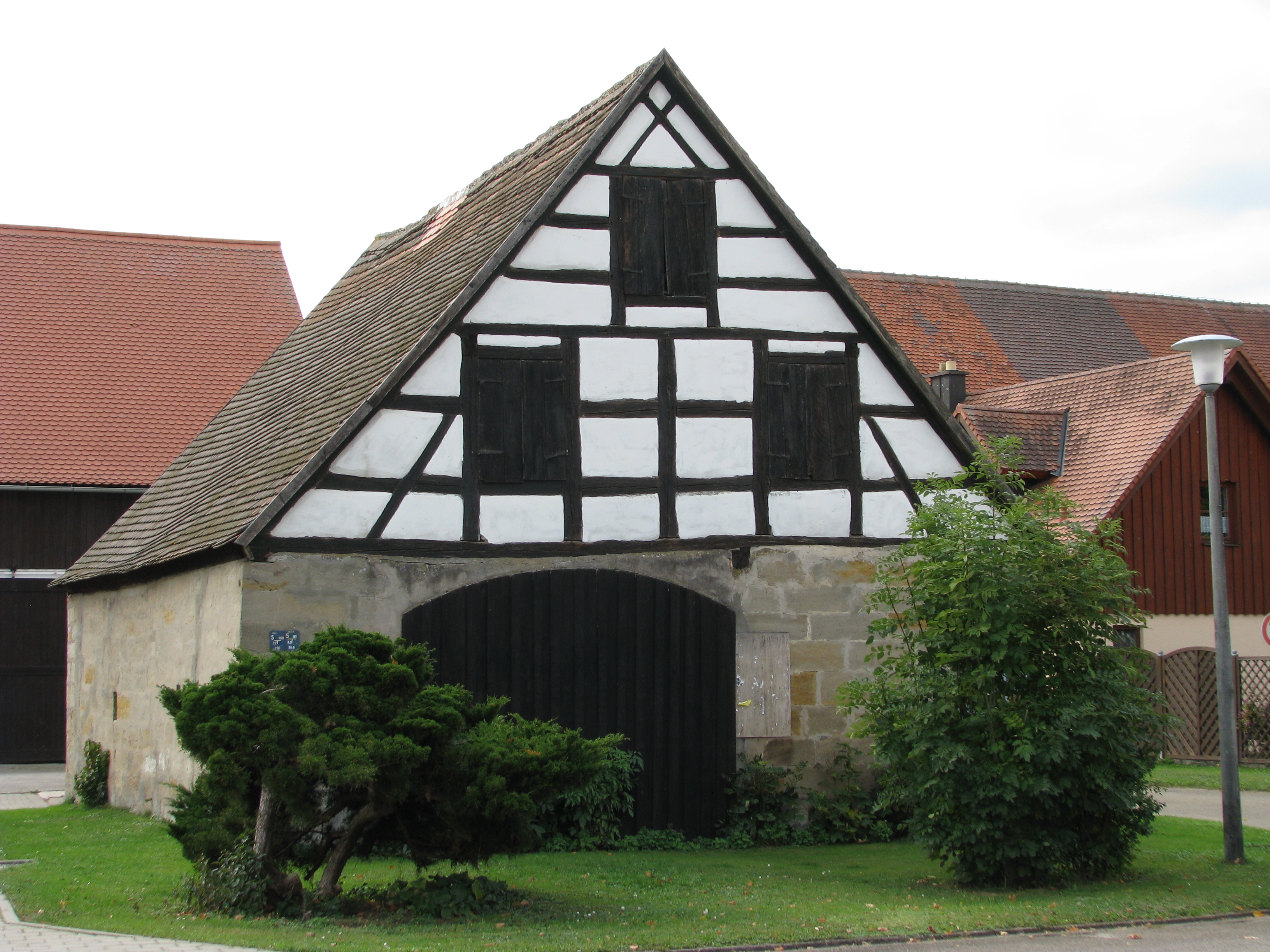 Kippenwang, Gemeindeteil von Heideck im mittelfränkischen Landkreis Roth, Sandstein-Scheune mit Fachwerkgiebel